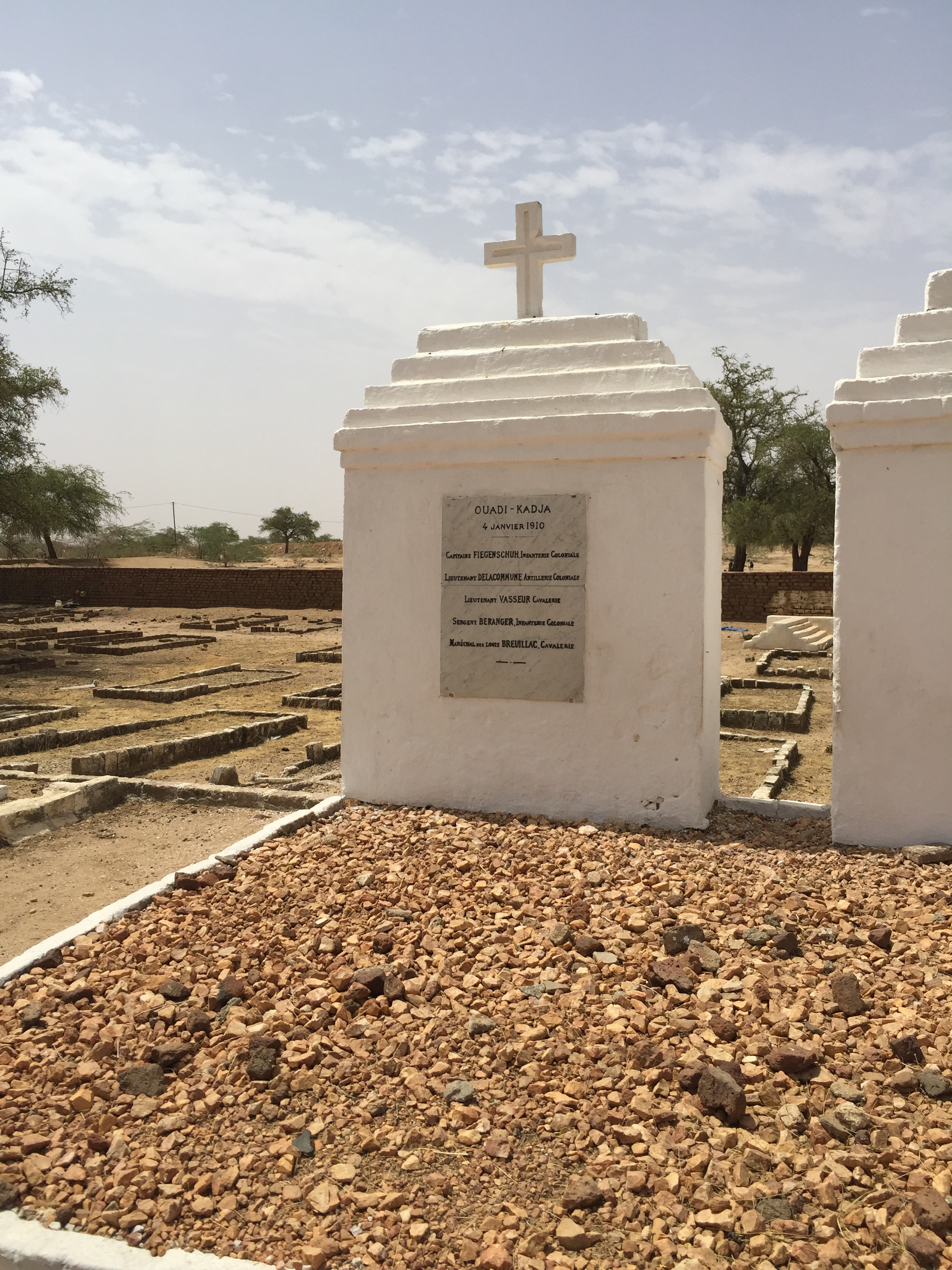 A Abéché il y a trois monuments, Nous sommes rendu hommage a ces valeureux troupes mortes pour la France